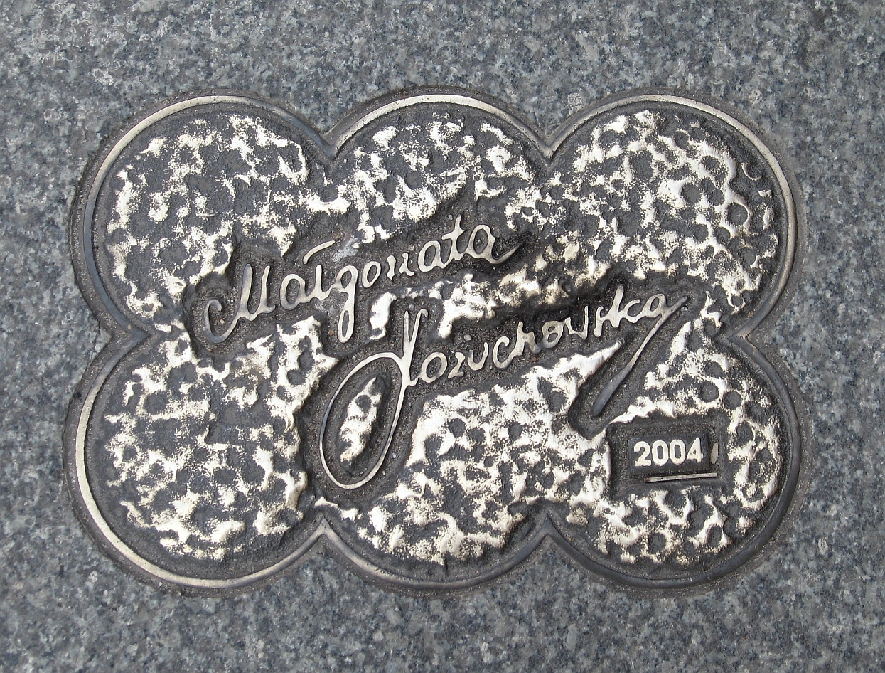 Toruńska "katarzynka" Małgorzaty Kożuchowskiej.